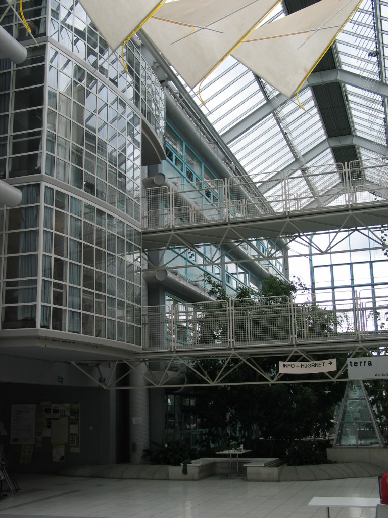 NTNU in Trondheim. Interior from Elektrobygget at Gløshaugen.